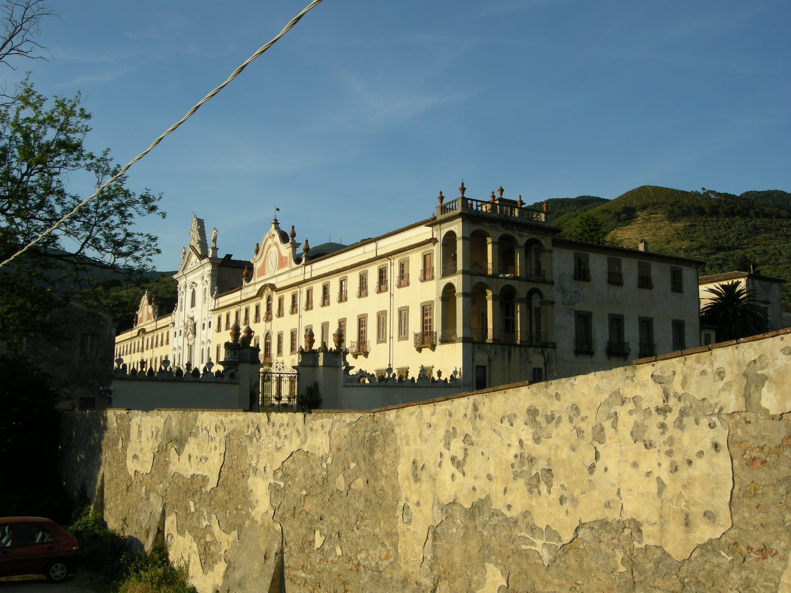 Certosa di calci, veduta